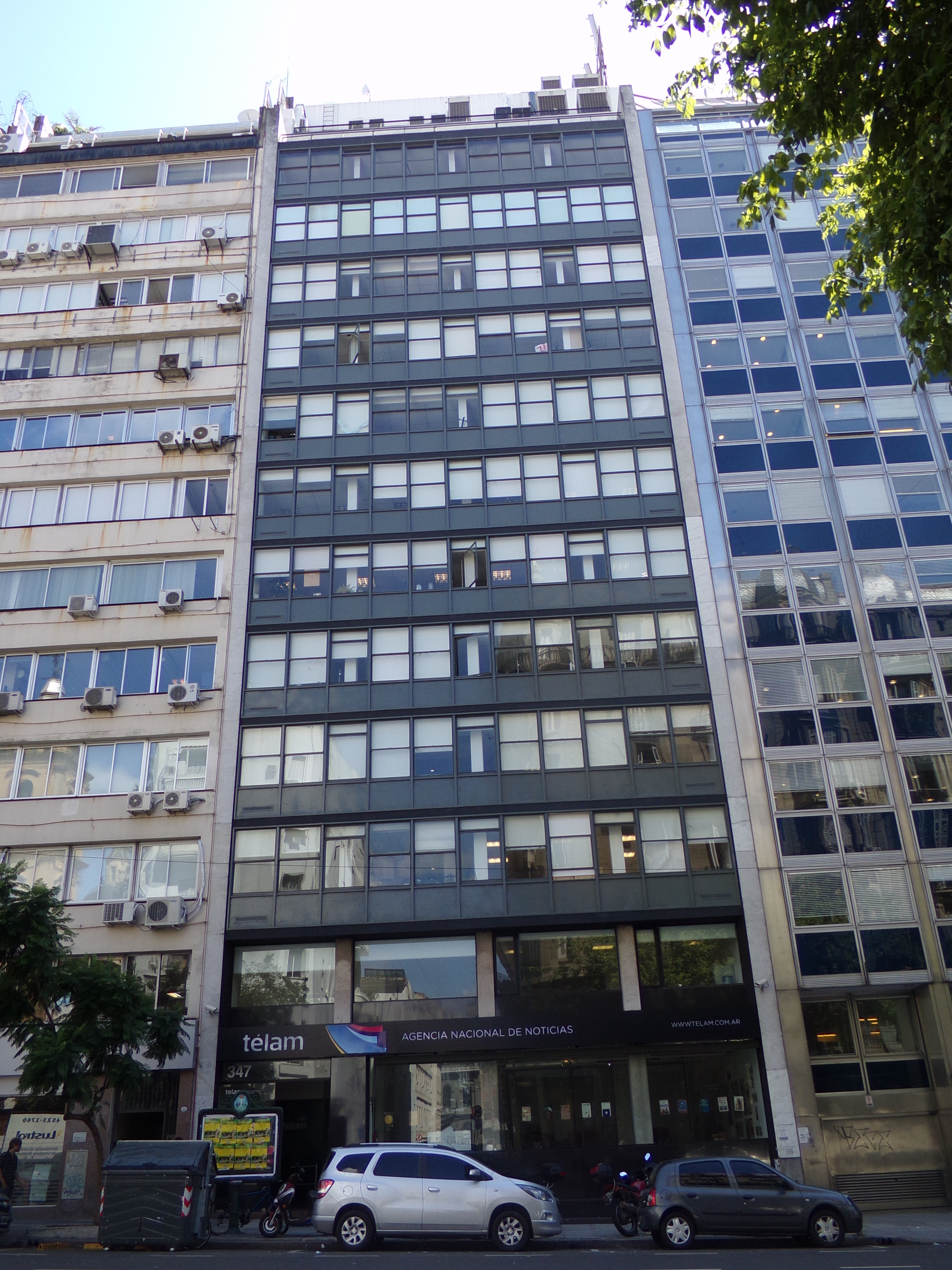 Sede de la Agencia Télam en la Avenida Belgrano, Buenos Aires.